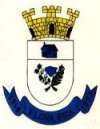 Brasão de Armas do município paulista de Flora Rica, Brasil.